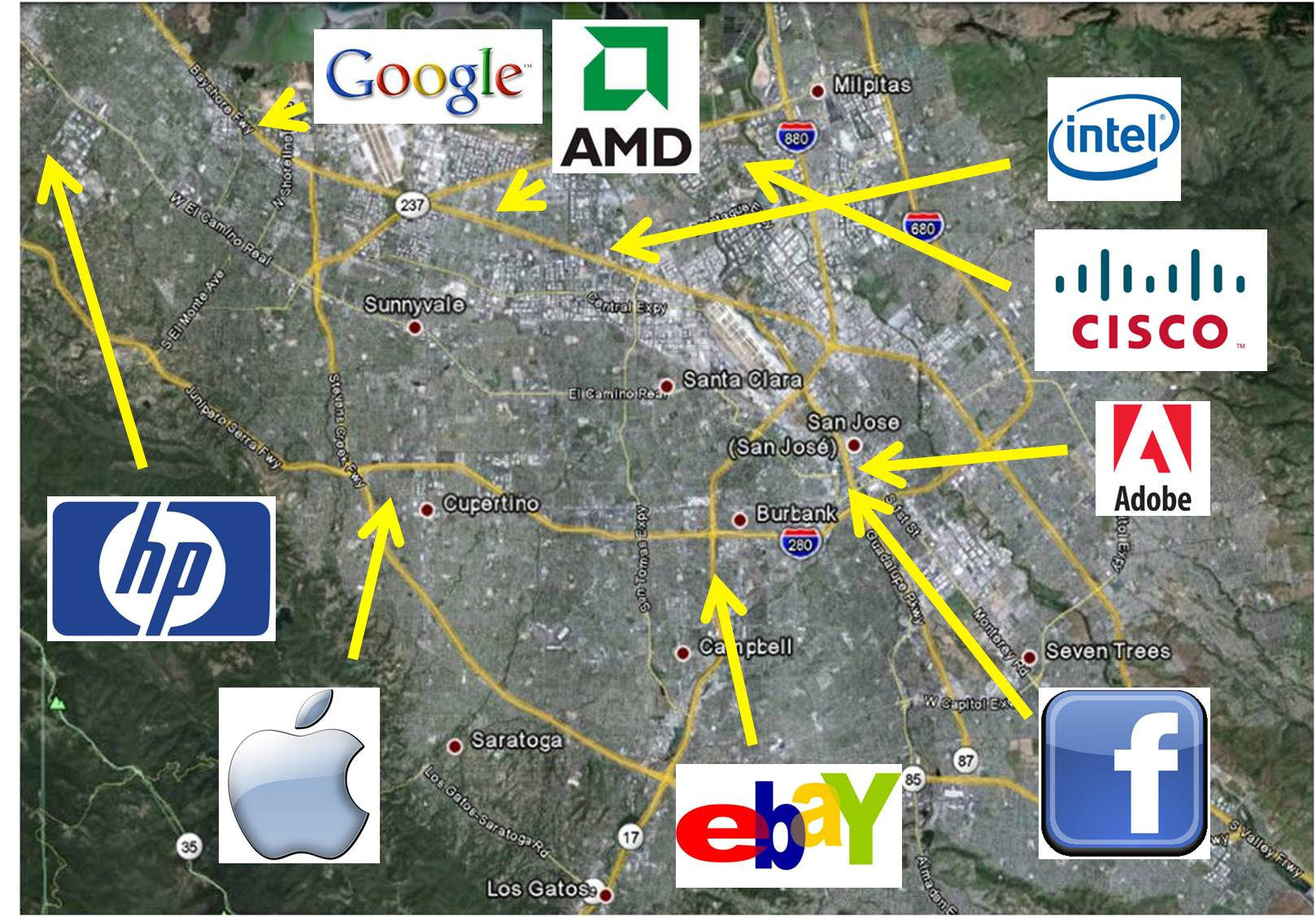 Dies ist eine Übersicht der wichtigsten Frimen im Silicon Valley/Californien/USA